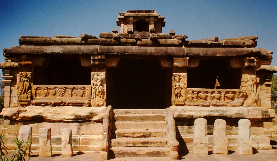 Aihole, Lad-Khan-Tempel